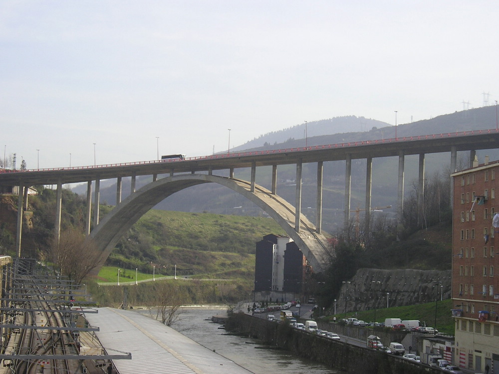 Mirafloreseko zubia.